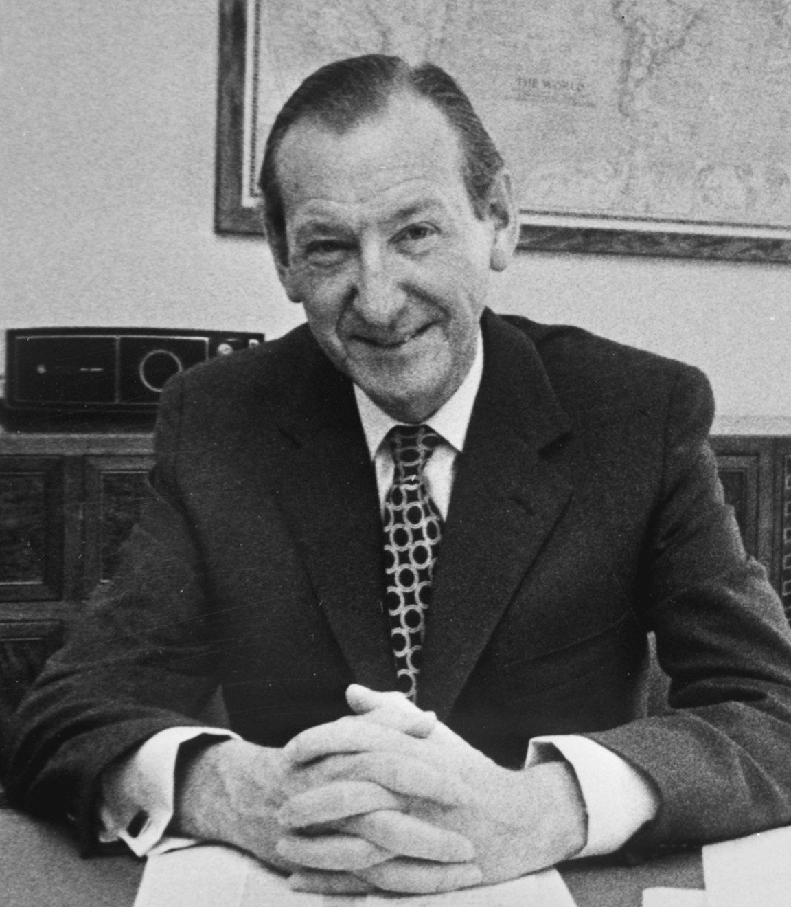 Dr. Kurt Waldheim (UNO ambassadeur Oostenrijk) voorgedragen als secretaris-generaal VN, Waldheim achter bureau